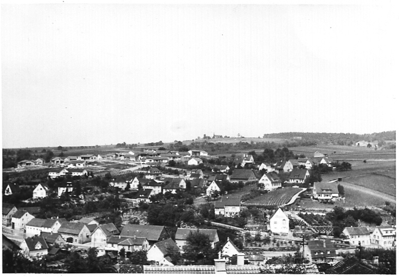 Talheim im Mai 1962, Blick Richtung Norden